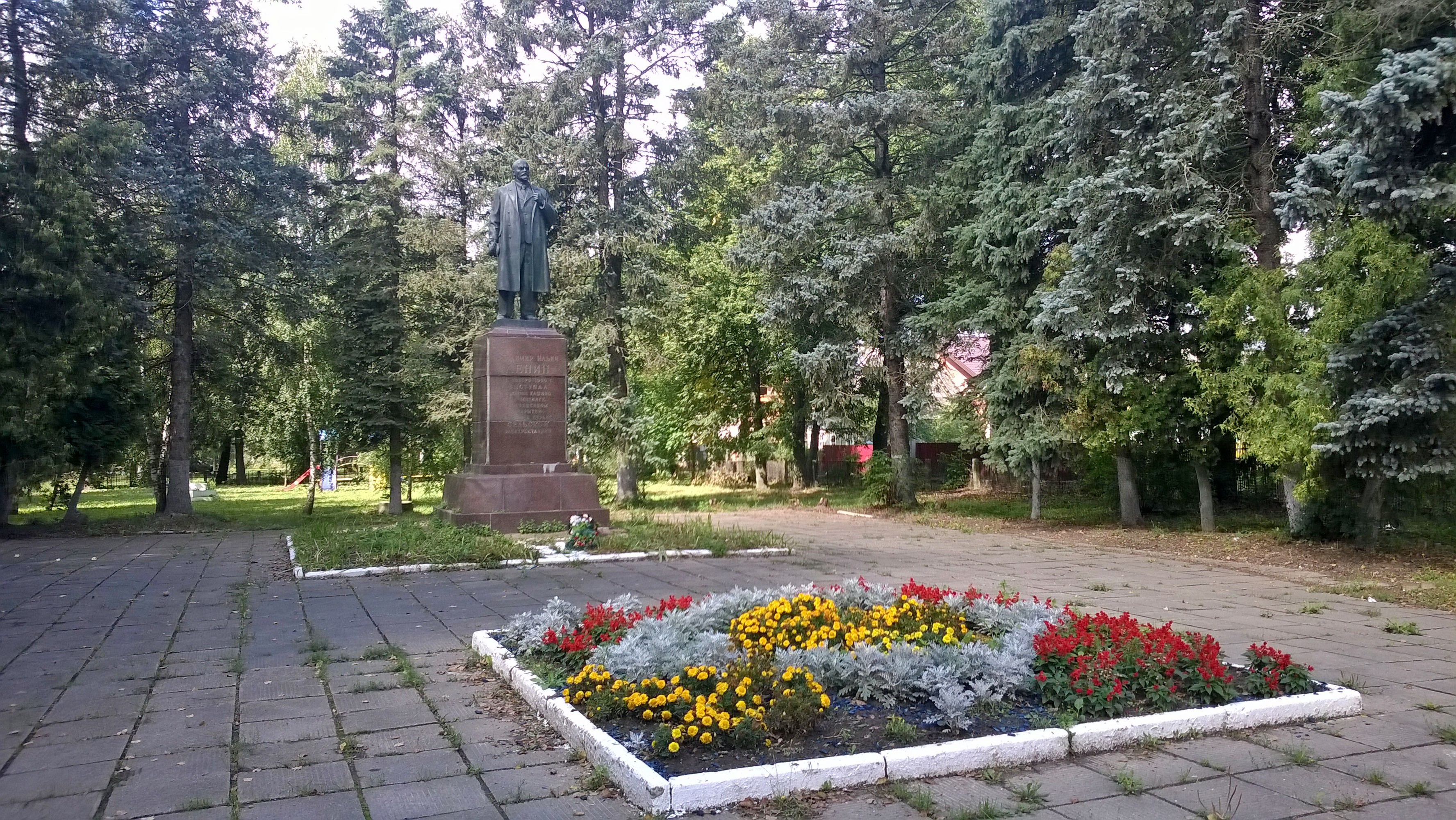 Памятник Ленину в Кашине